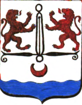 Armes de la famille de Grand Ry